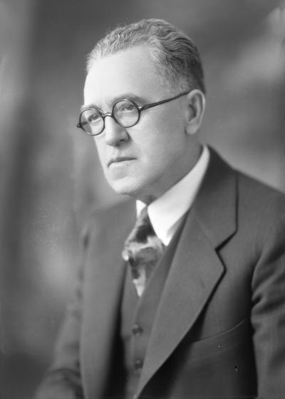 Lieutenant Governor Gellatly